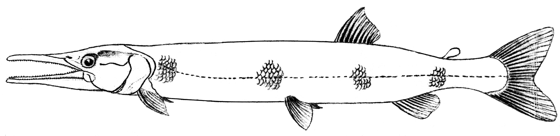 Xiphostoma lucius